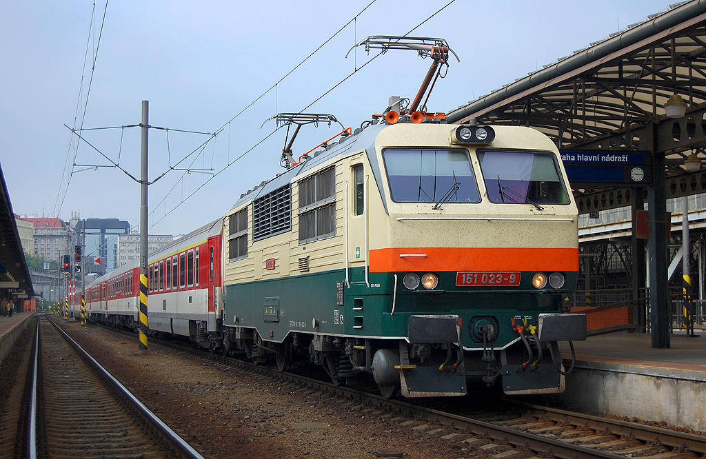 Lokomotiva 151.023 v retro nátěru čeká na odjezd z pražského hlavního nádraží v čele Ex 121 Košičan.